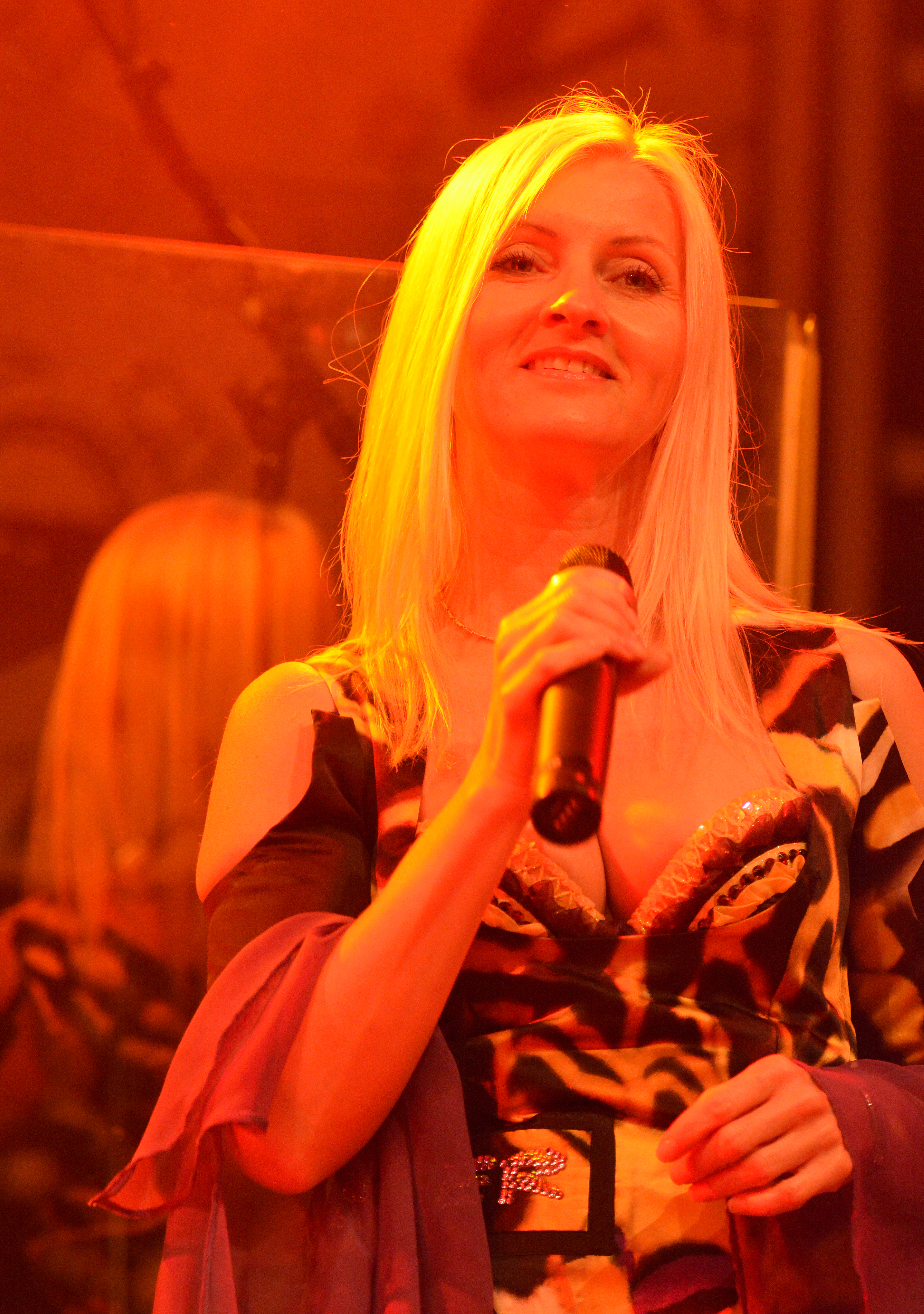 SängerinAstrid Wirtenberger von Seer bei Appen musiziert 2014